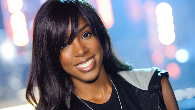 Kelly Rowland beim Walmart Soundcheck im September 2010.